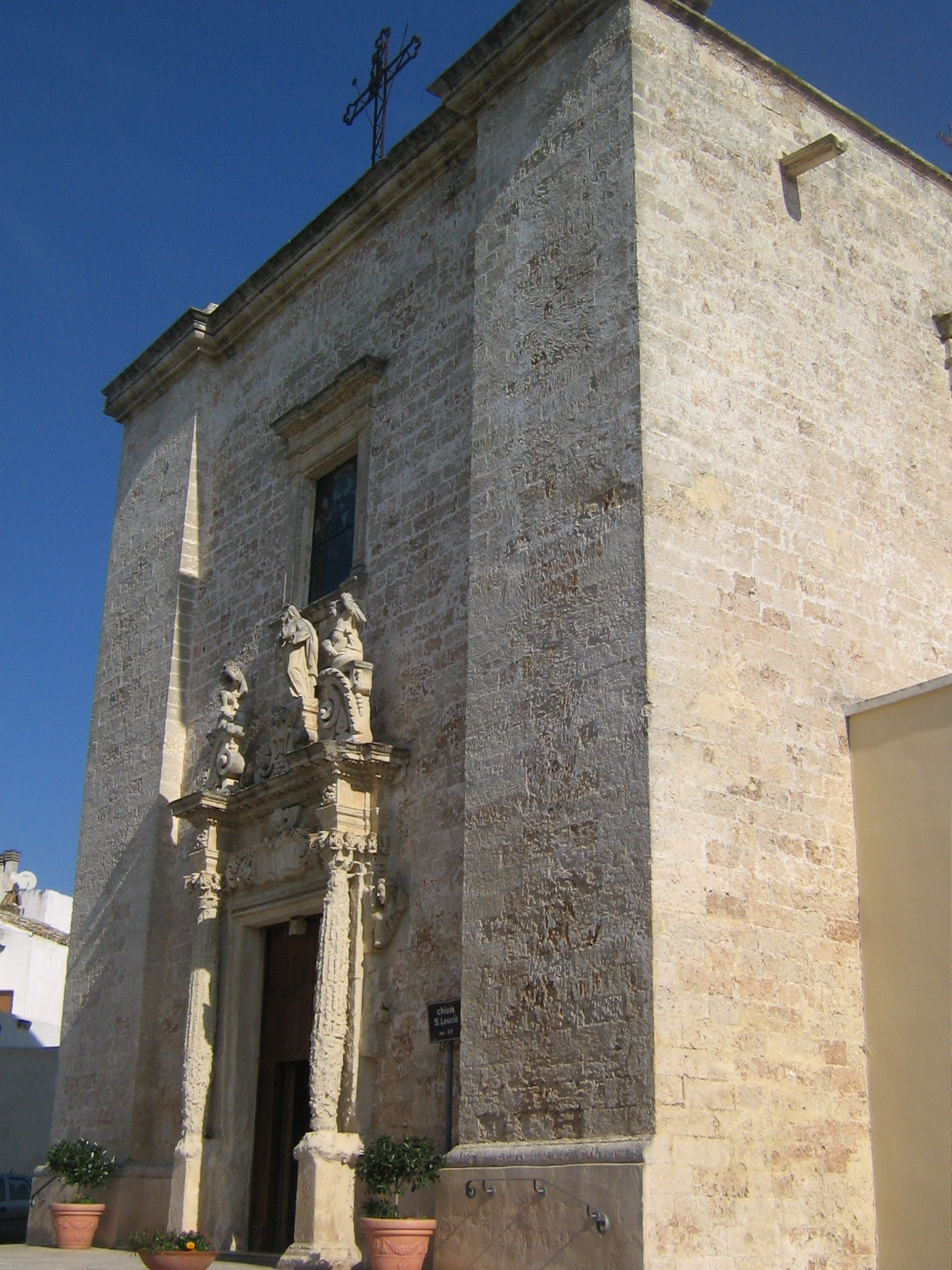 Chiesa Madre di Felline, Puglia, Italy